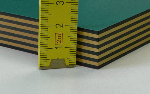 Schichtpressstoff (ca. 2 cm dick), bei dem mehrere Schichten verschieden Eingefärbt sind